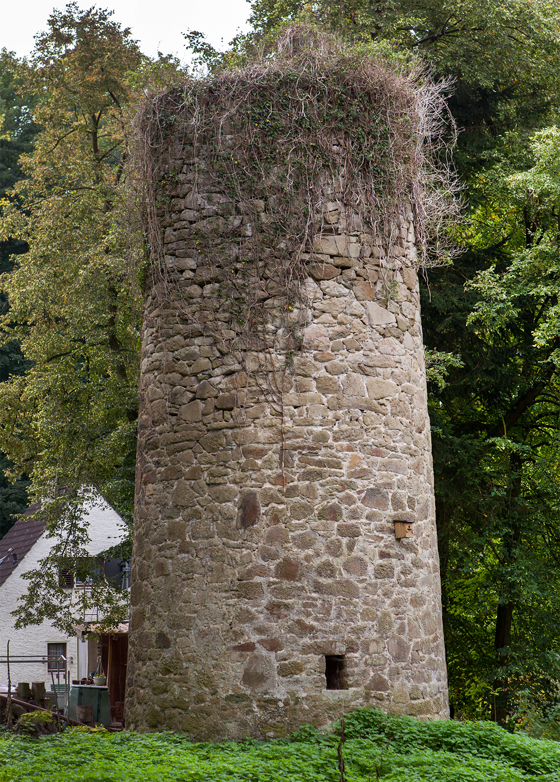 Windmühlenstumpf in Wüsten (Bad Salzuflen); die Mühle war Wind- und Wassermühle zugleich This is a photograph of an architectural monument.